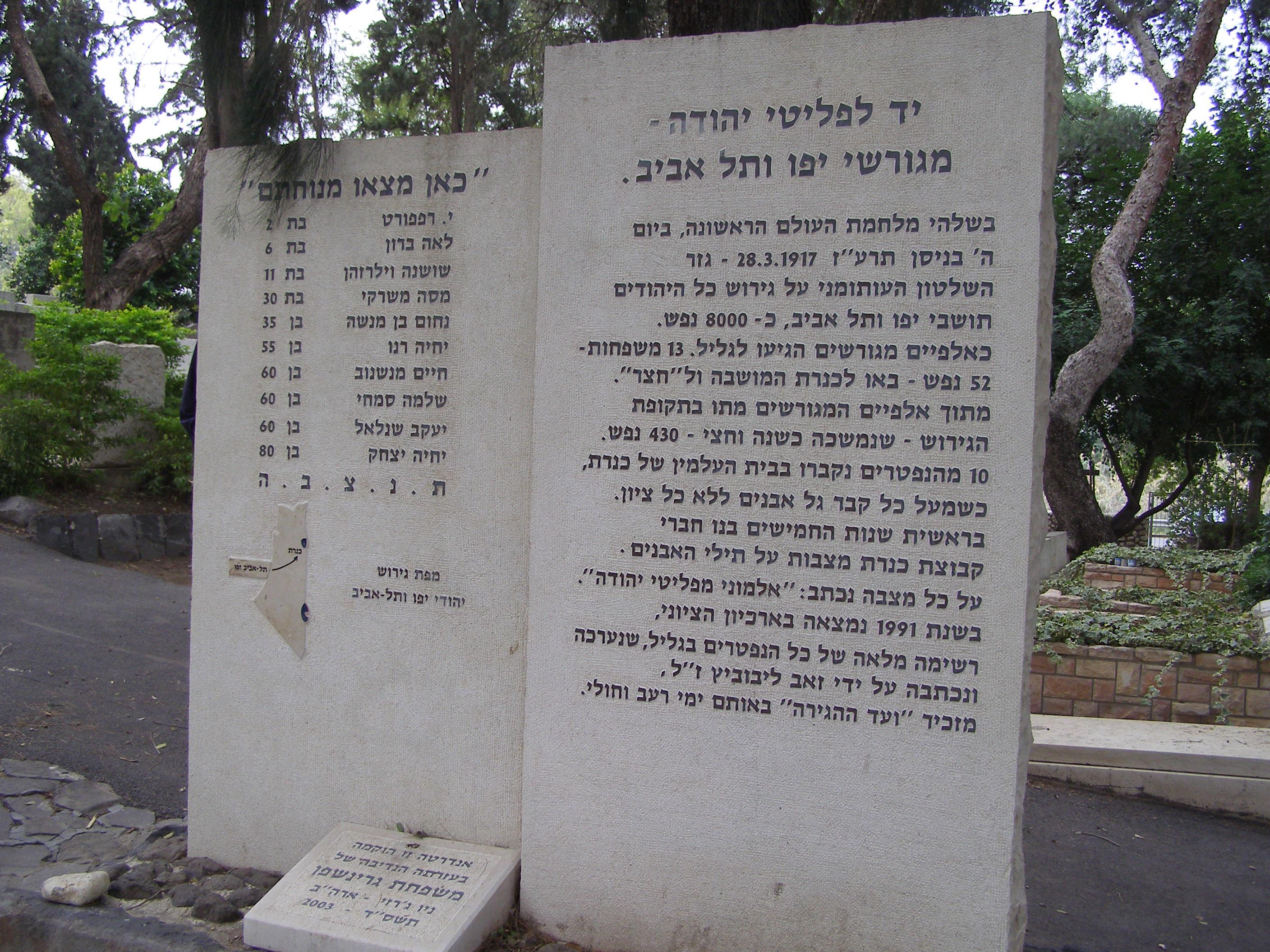 מצבת גירוש תל אביב בבית הקברות של כנרת רישיון נוצר על ידי משתמש:Ranbar